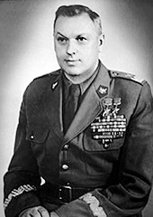 Константин Константинович Рокоссовский (1896 — 1968) — советский военачальник. Министр национальной обороны Польши с присвоением воинского звания маршала Польши (1949-1956)